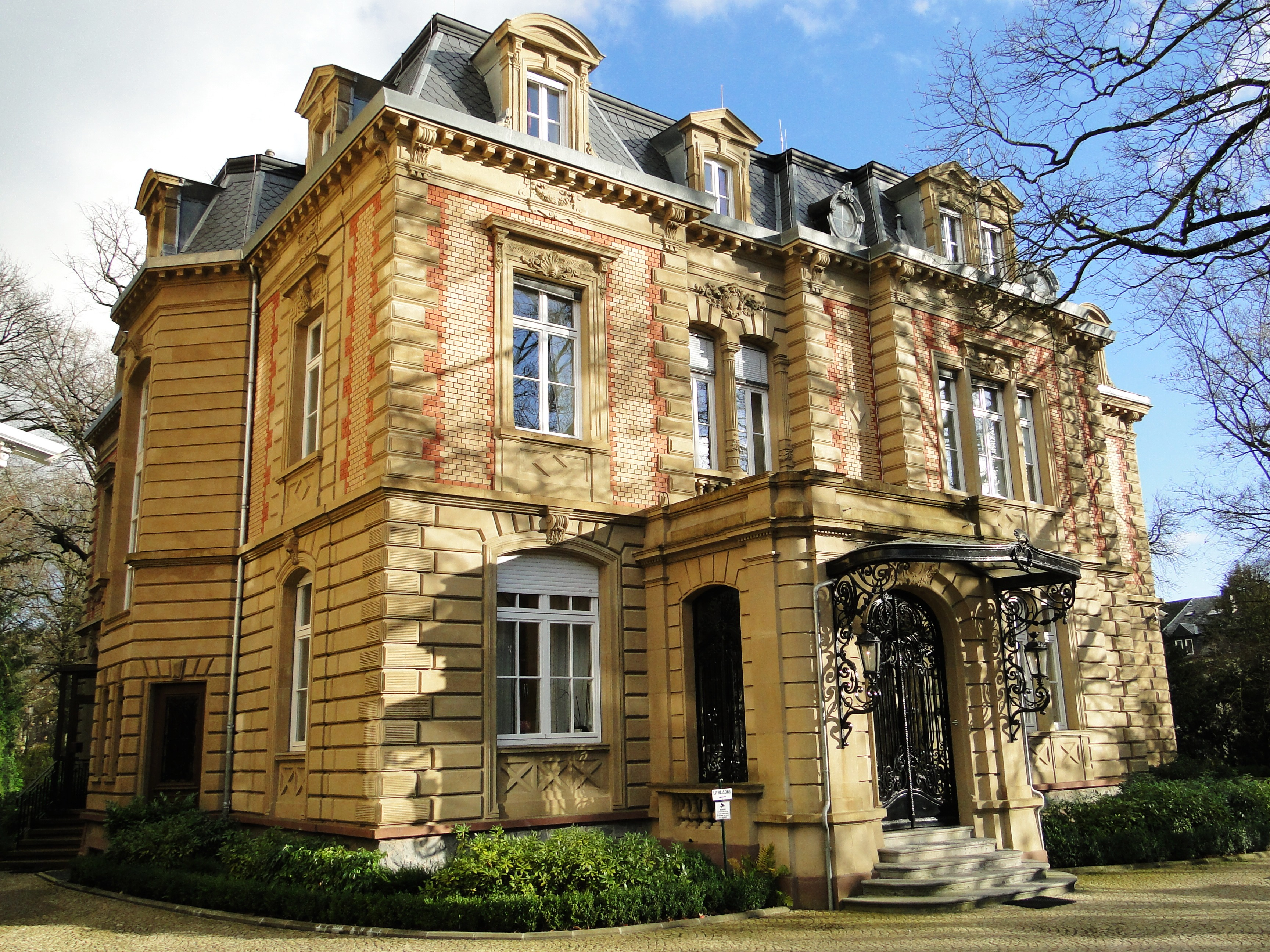 Luxembourg, boulevard Joseph II. Maison 10, Villa Foch. Actuellement East-West United Bank SA